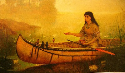 Minnehaha Feeding Birds